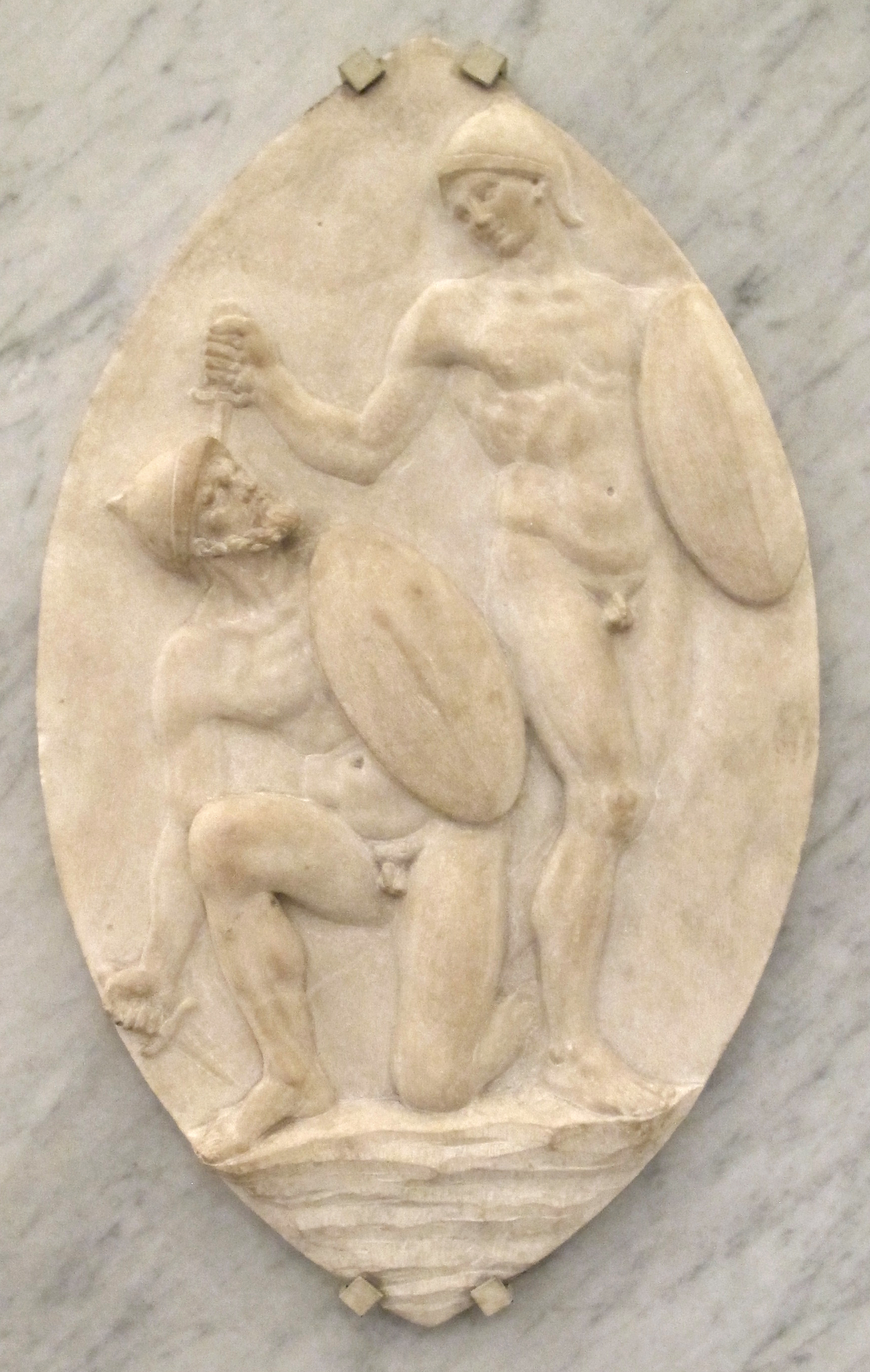 scultura italiana al Louvre